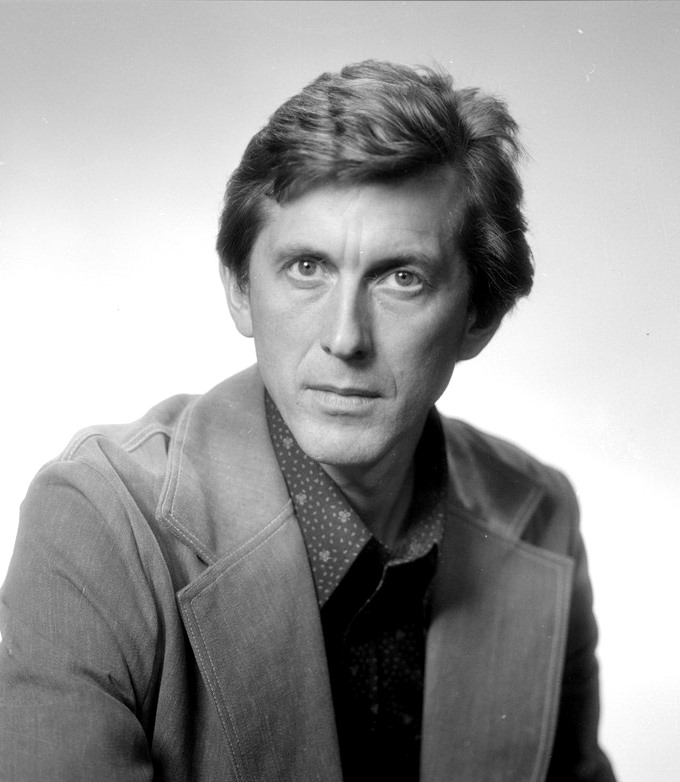 Trond Gjerdi, portrett, mann, etnolog, museumsdirektør, forfatter, brystbilde.